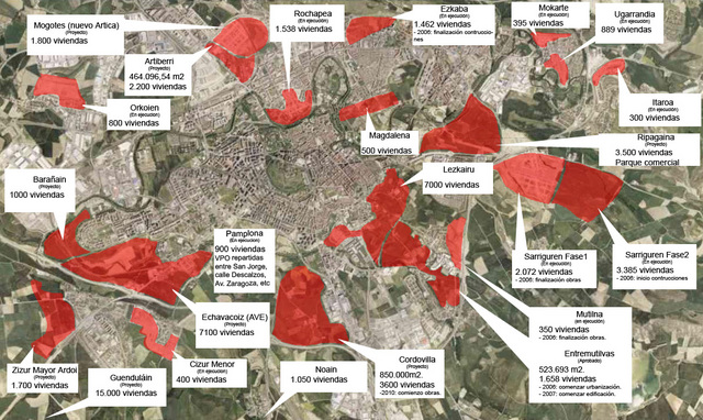 e